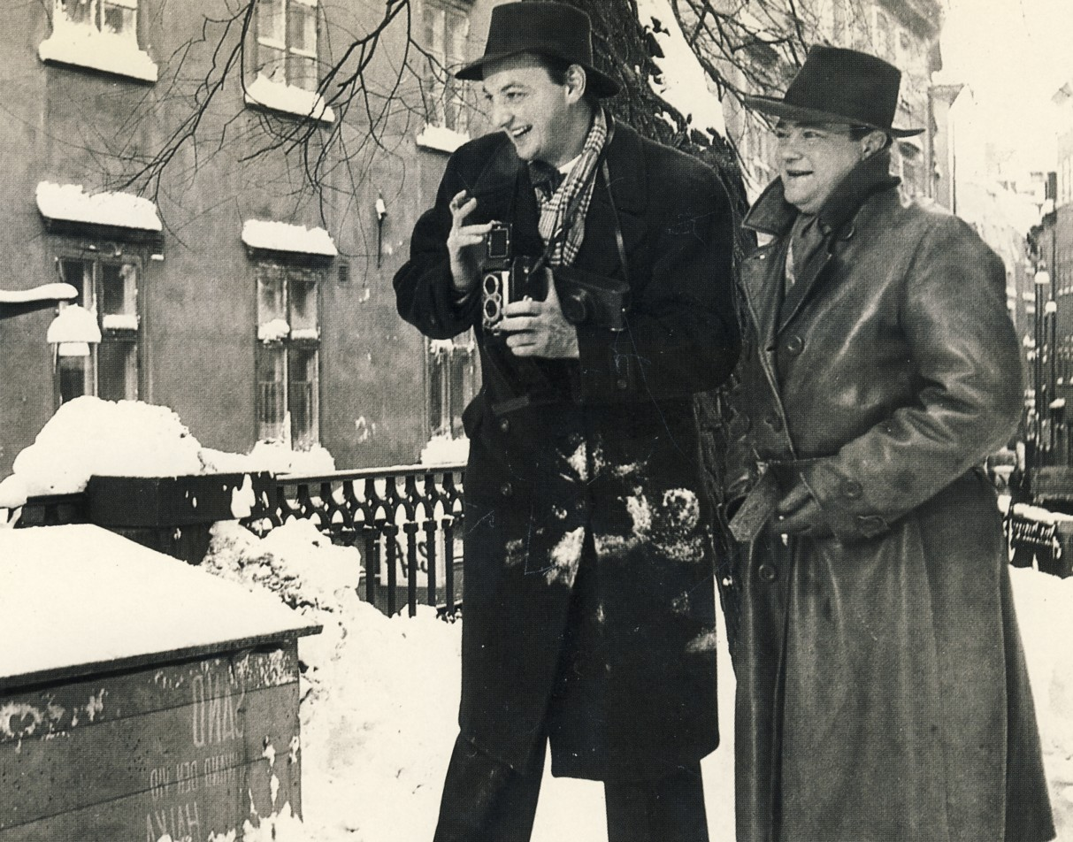 Författaren Stig Trenter (höger) med sin romanfigur Harry Friberg (Fotografen K W Gullers)